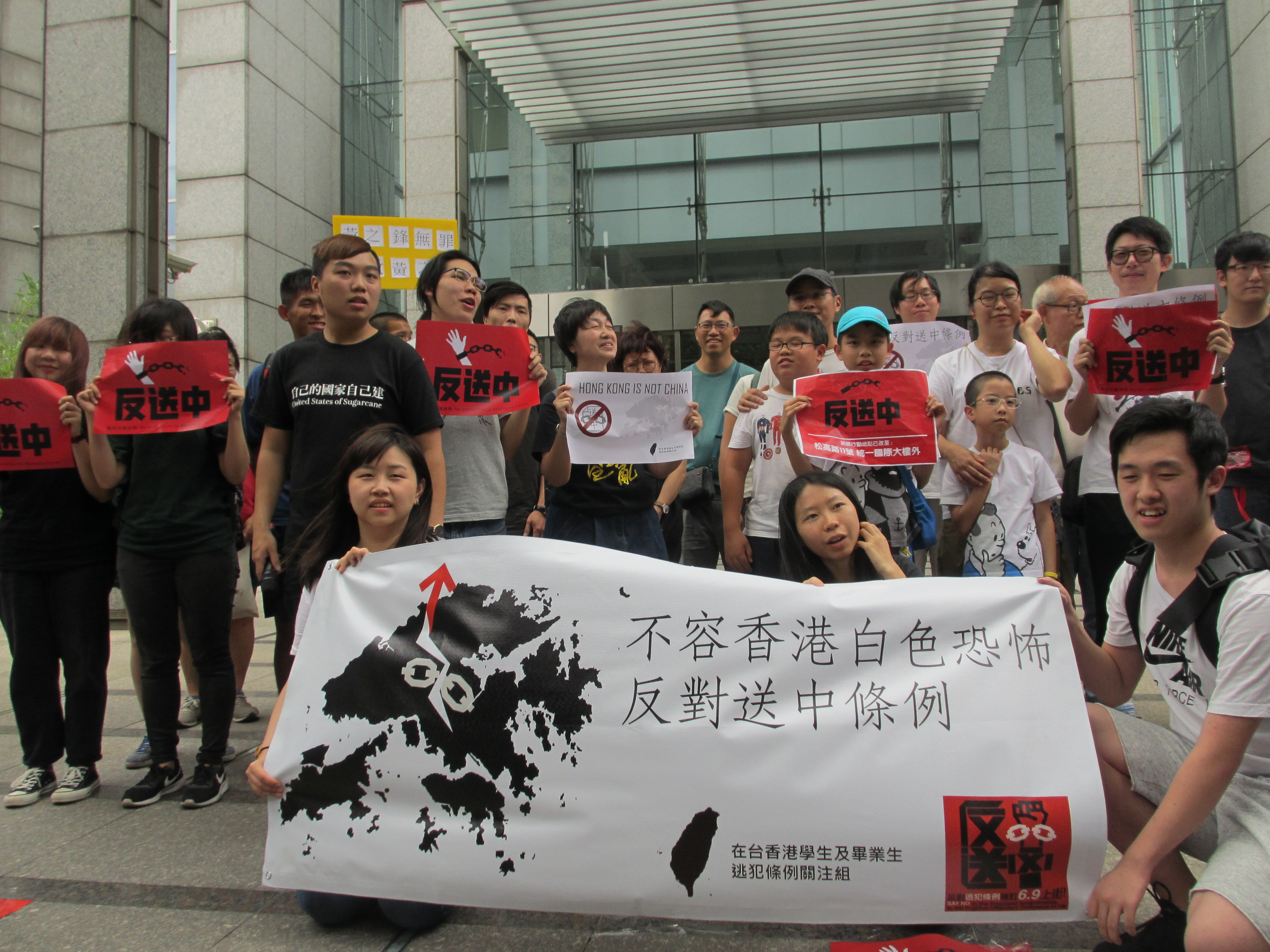 六百位在台香港學生聯名反對逃犯條例修法